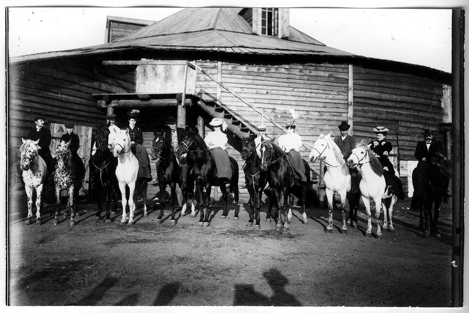 Цирк Струкова на Новобазарной площади